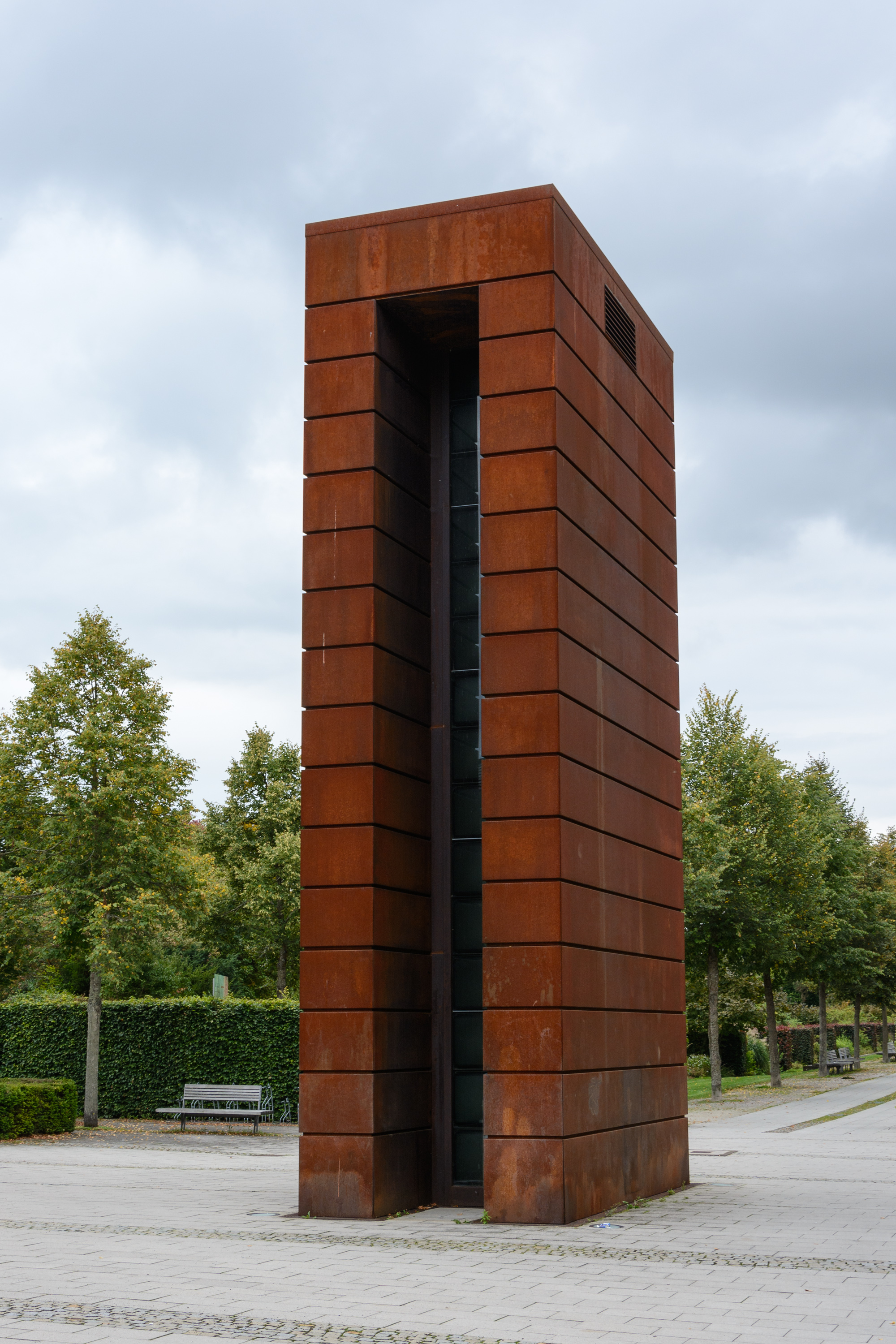 Open-Air-Videoinstallation „Waterfire“ des Künstlers Fabrizio Plessi vor dem Eingang zum Landesgartenschaugelände in Kronach.